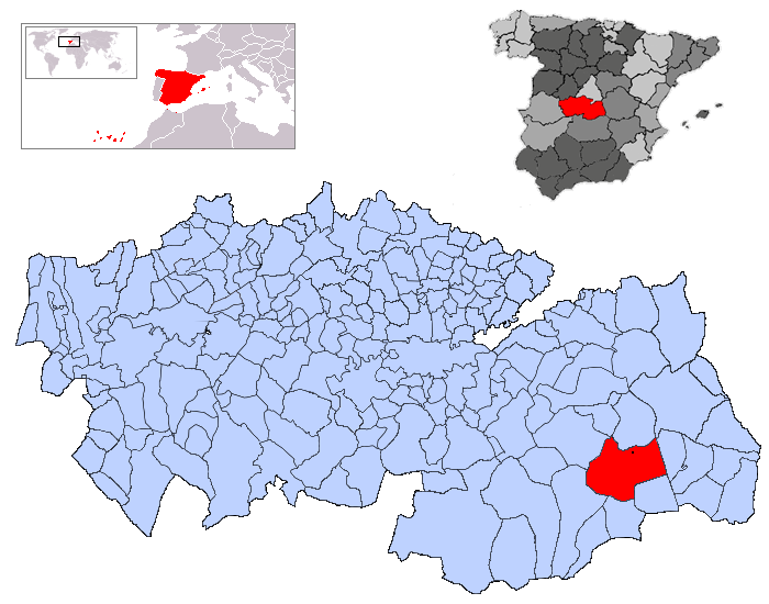 Villacañas en la provincia de Toledo